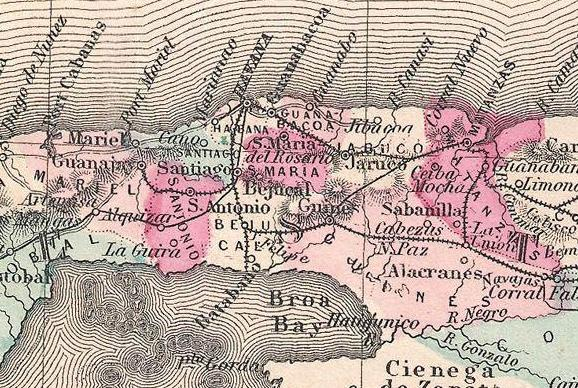 Territorios de la Provincia de La Habana en 1862. Fragmento del Mapa de Cuba de Jonhson 1862